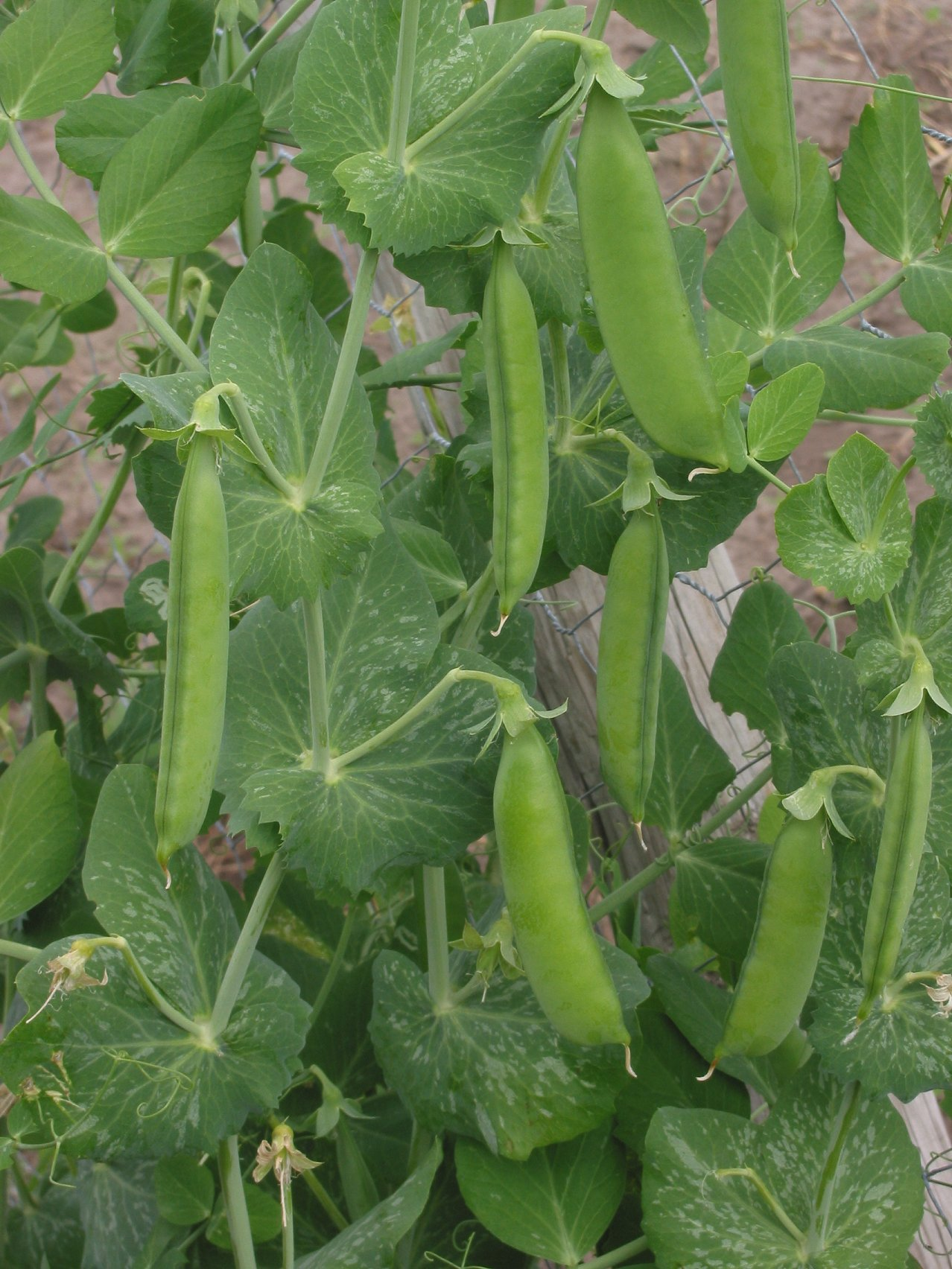 (Doperwt rijserwt peulen)Pisum sativum pods